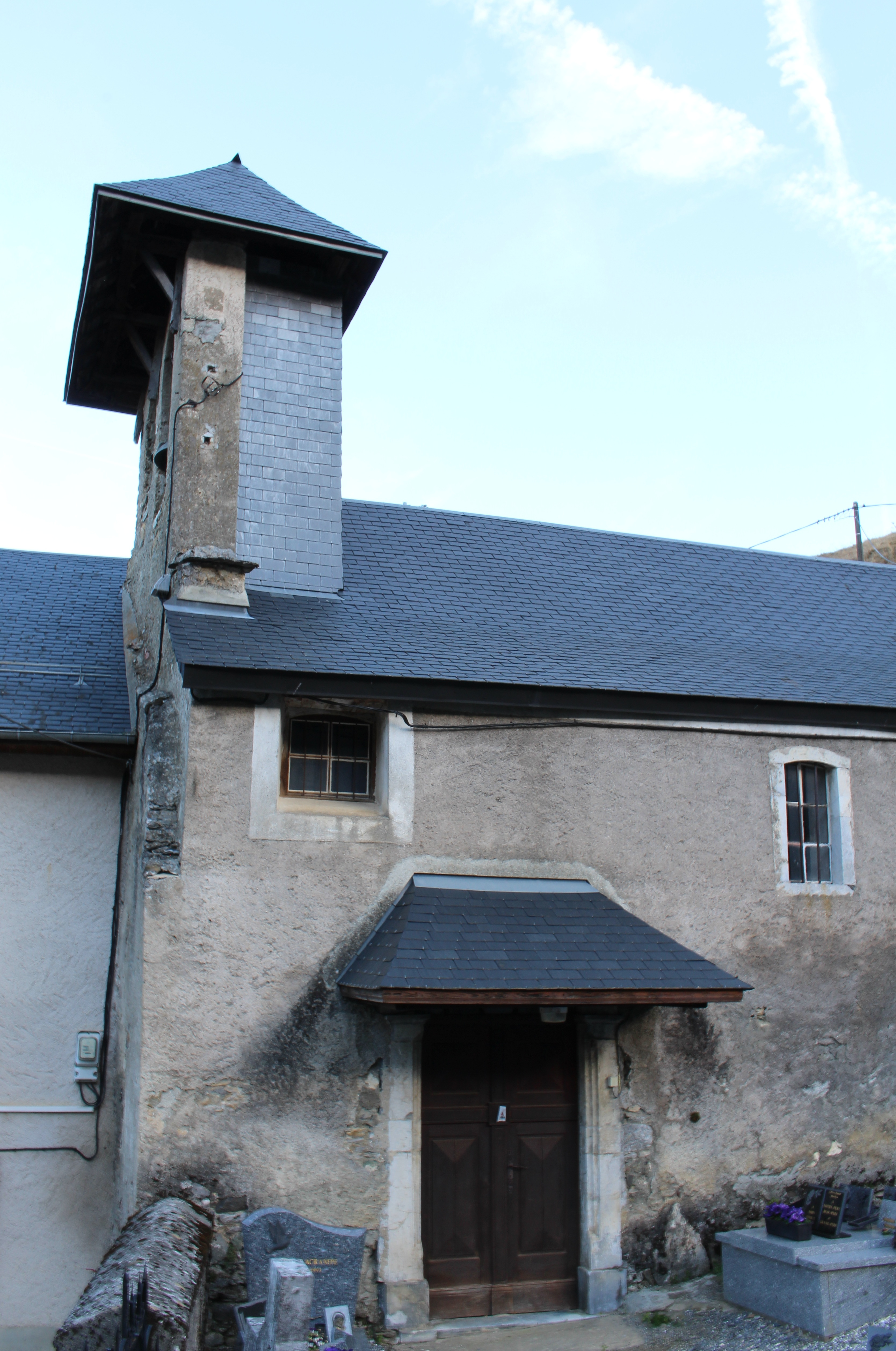 Église Saint-Jean-Baptiste de Lias (Hautes-Pyrénées)